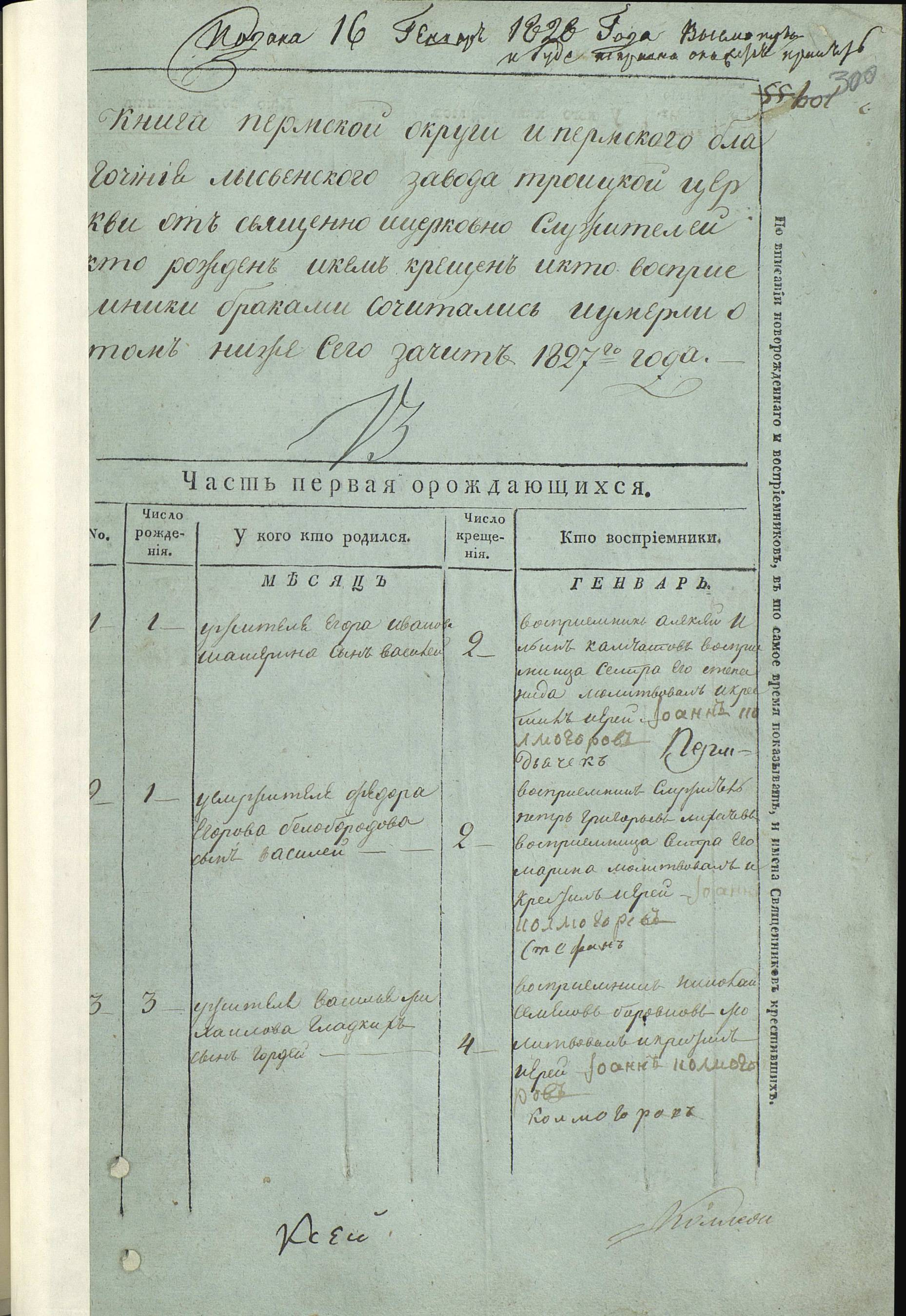 ГАПК Ф.37.Оп.1.Д.55а Метрическая книга Троицкой церкви Лысьвенского завода 1827 (заглавие часть о рождении)